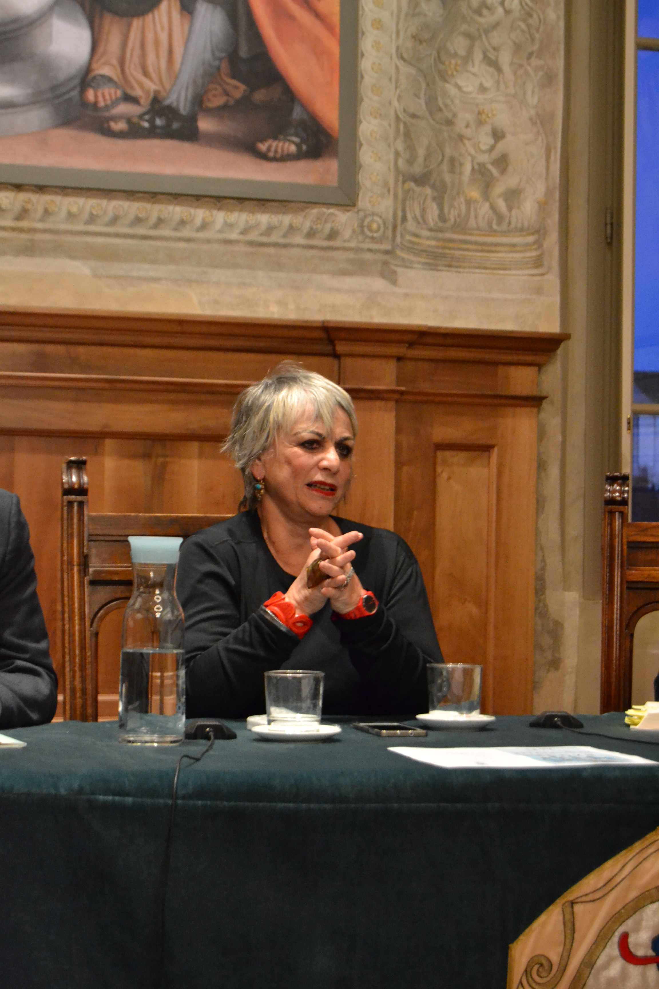 Manuela Dviri in Palazzo Loggia a Brescia alla presentazione di "Un mondo senza noi"